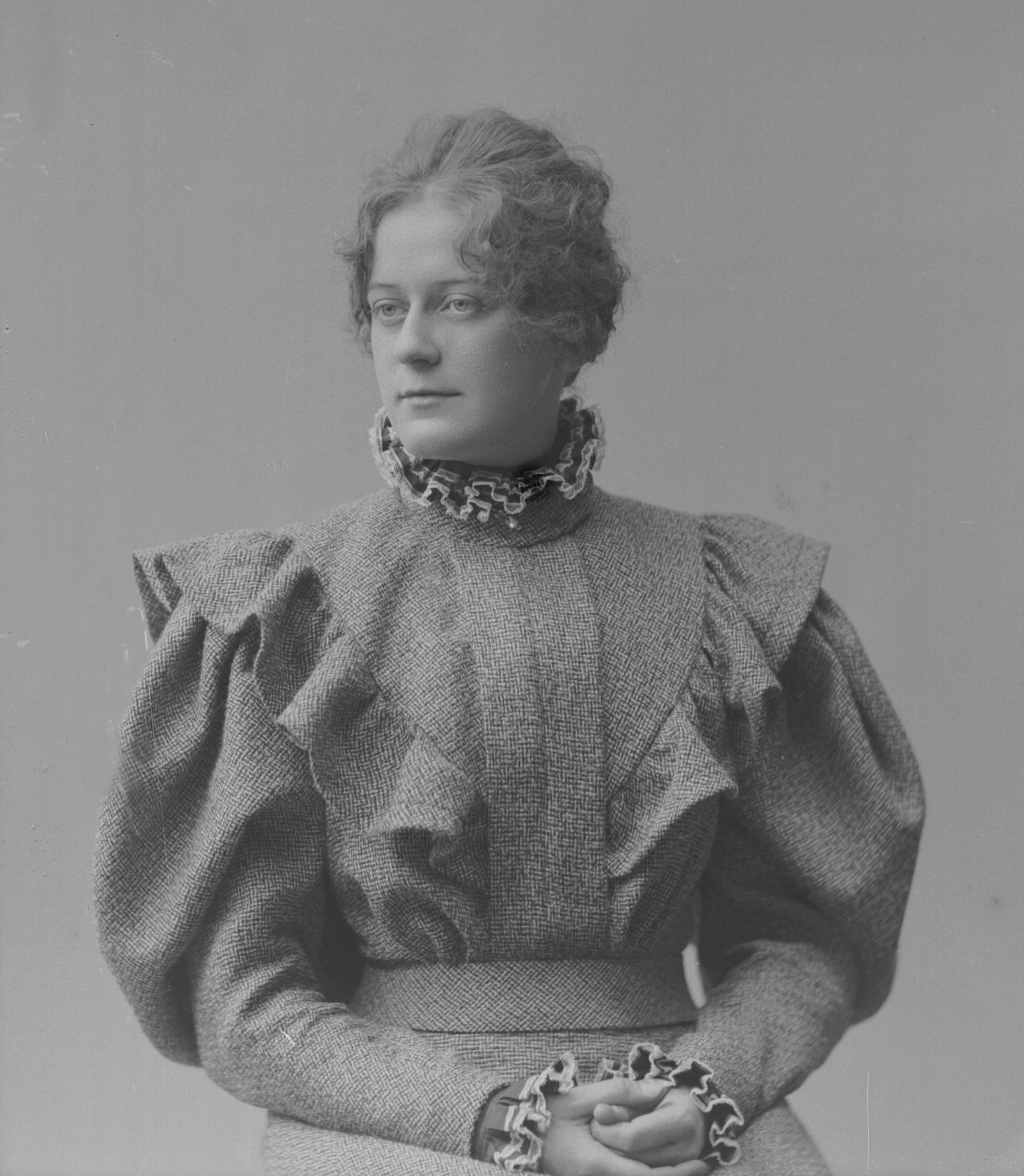 Billedhugger Aagot Vangen (1875-1905) fotografert av Gustav Borgen. Bildet tilhører Norsk Folkemuseums samlinger.